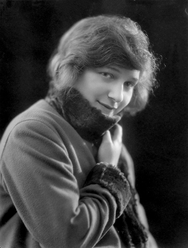 Ann Trevor